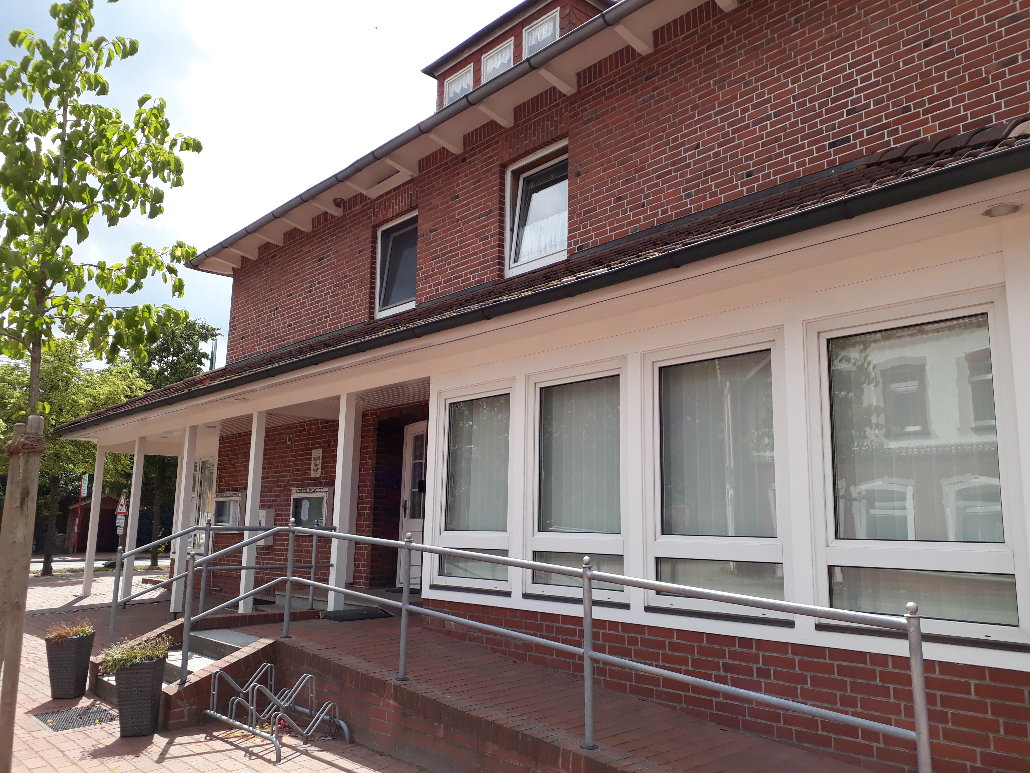 Gemeindeverwaltung Samtgemeinde Harsefeld, Außenstelle Ahlerstedt